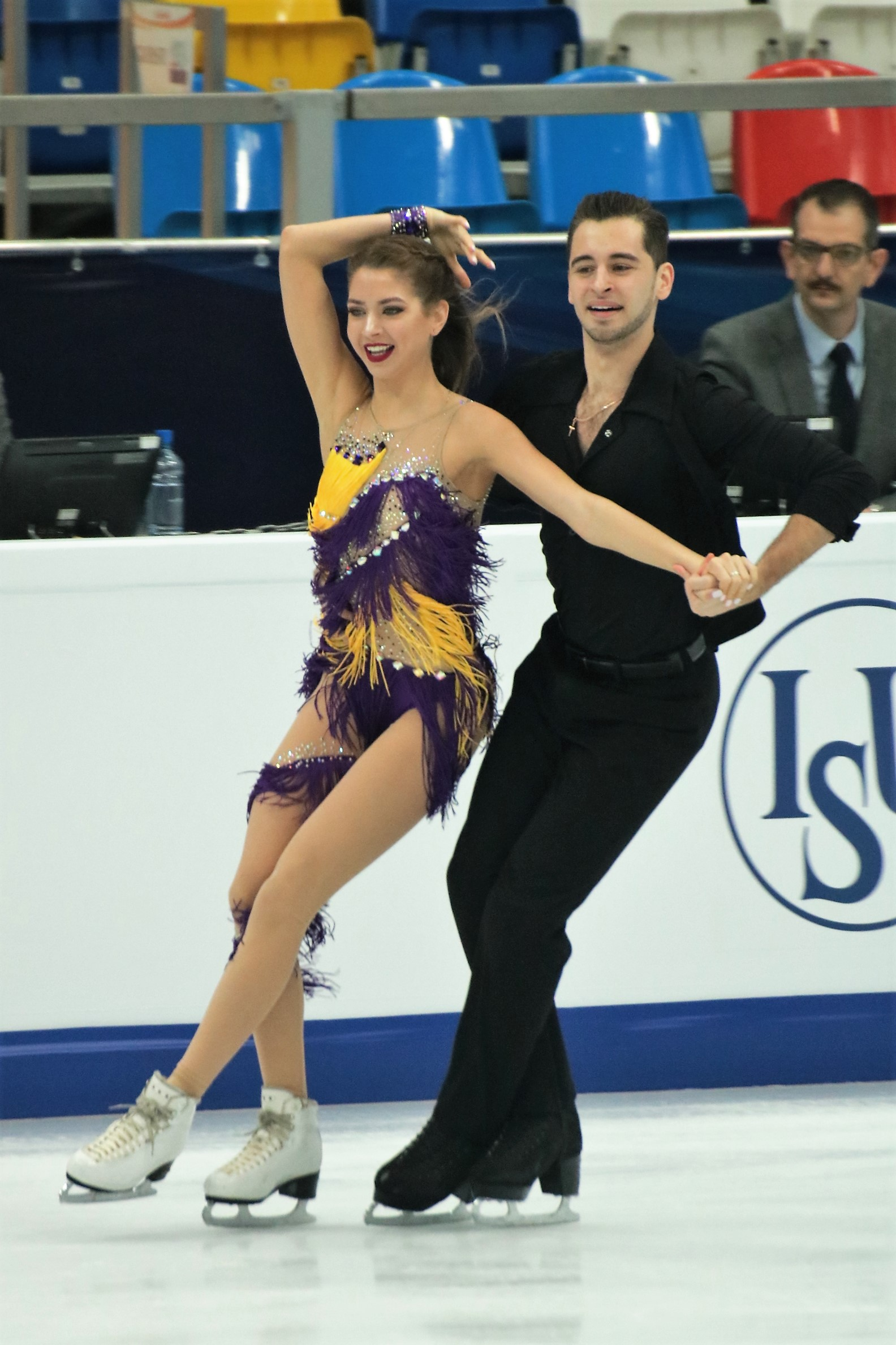 Александра Назарова / Максим Никитин (Украина) на Чемпионате Европы по фигурному катанию 2018.